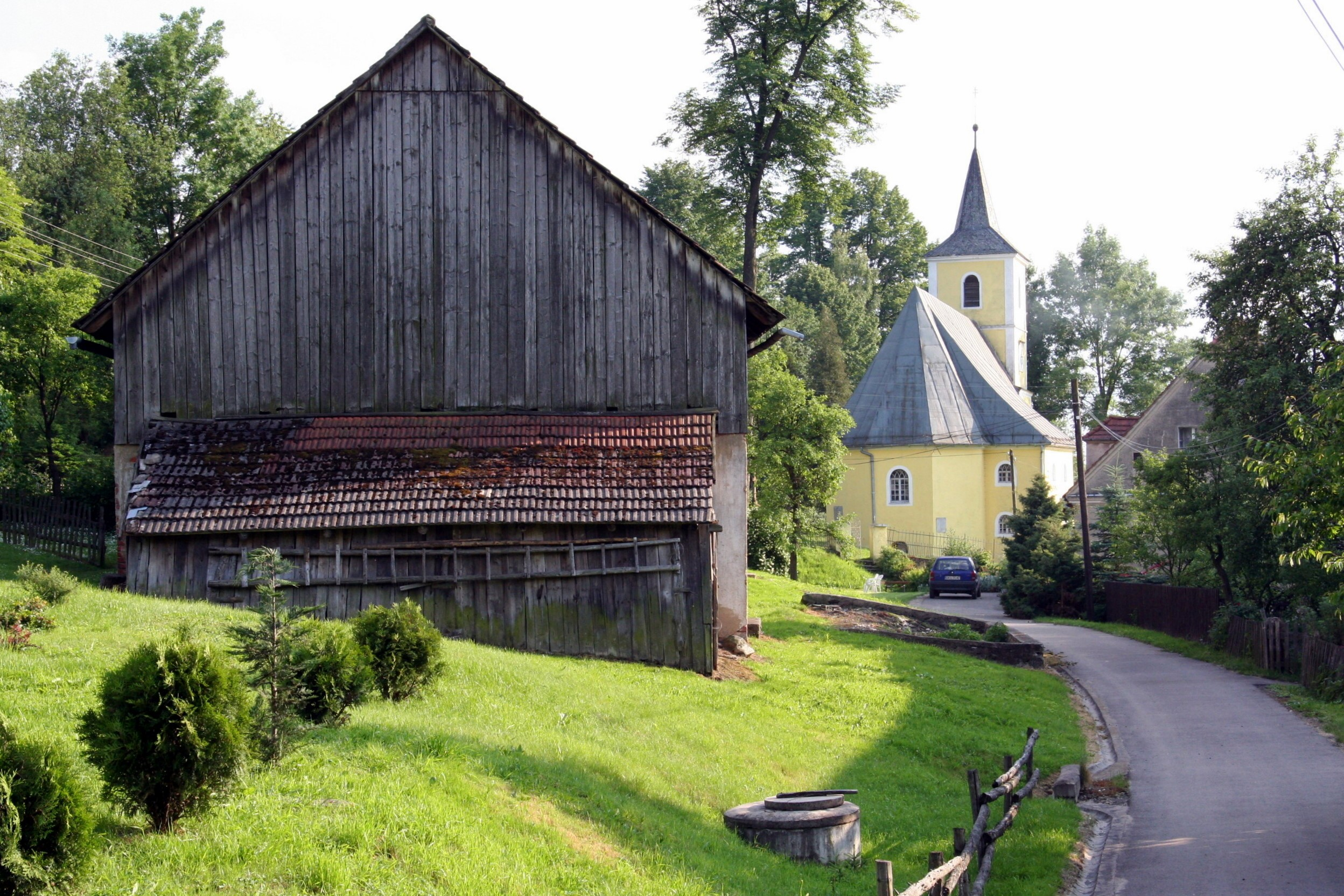 Kościół w Droszkowie